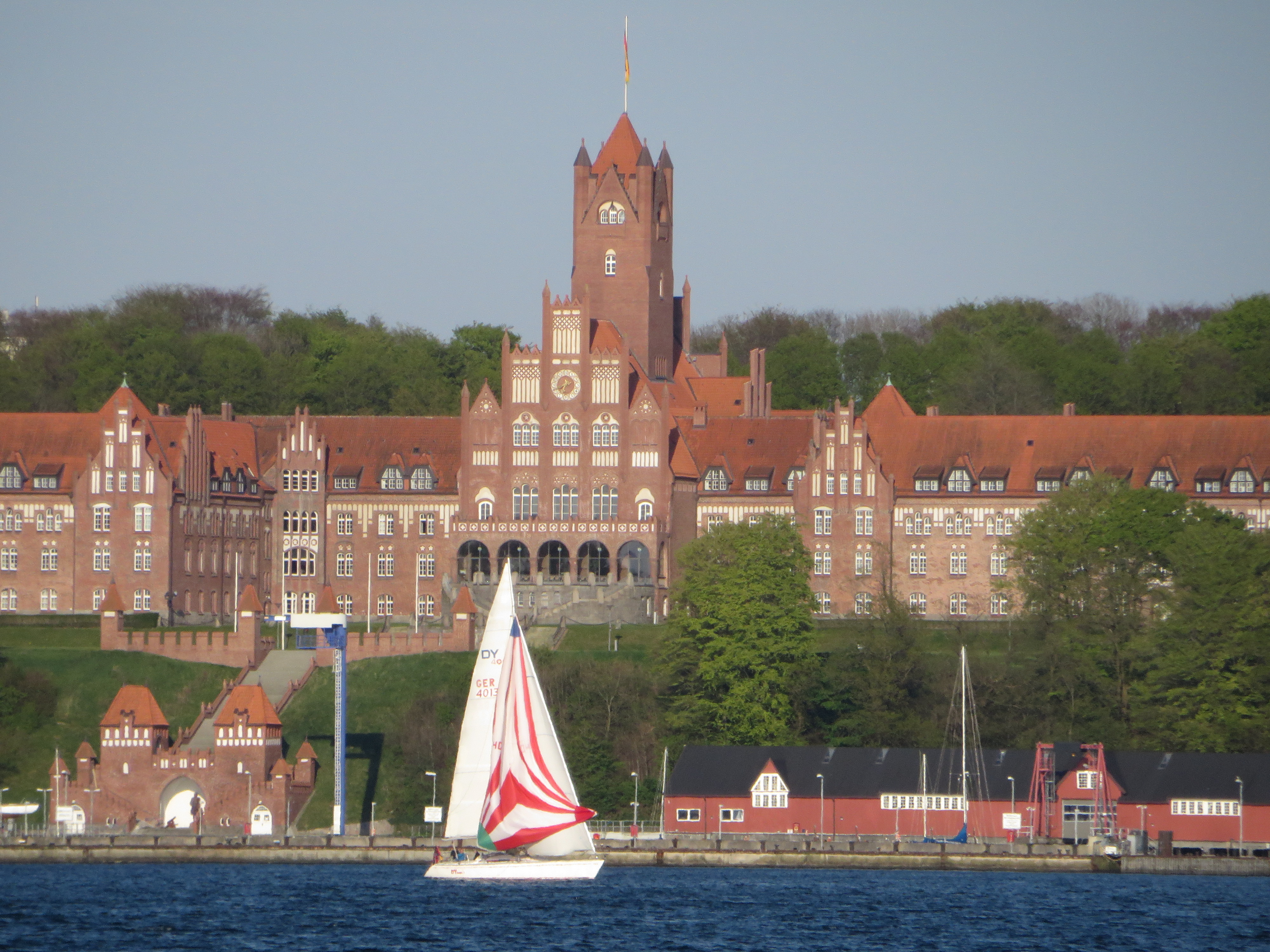 Rotes Schloss am Meer, Marine-Burg (Flensburg-Mürwik), 28 April 2014, Bild 05